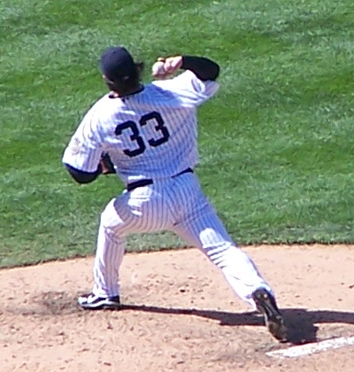 Brian Bruney